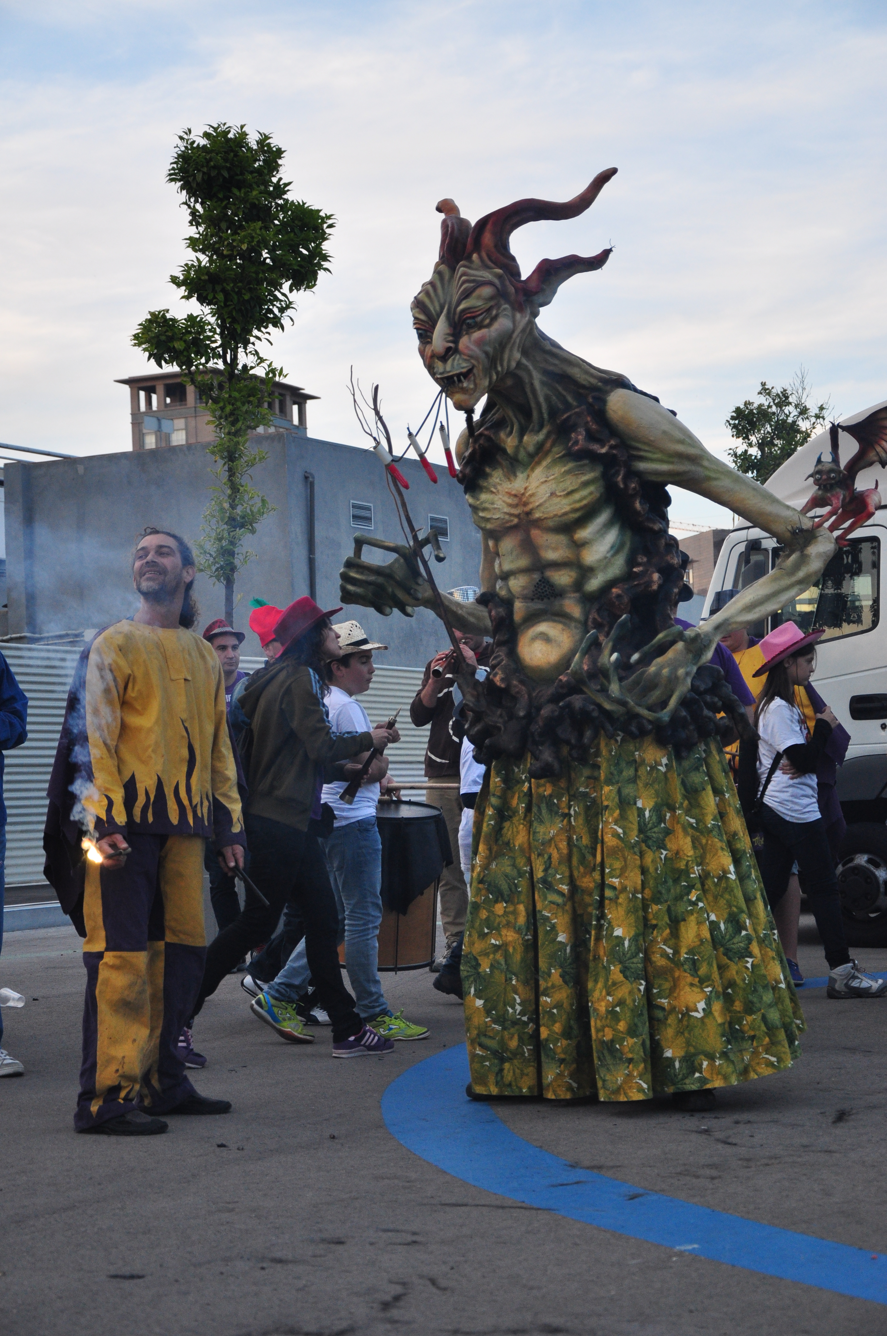 És un follet del bosc, esperit protector de la natura. Té una estructura de gegant amb el cos pràcticament tot esculpit i tot ella és una barreja d'elements de follet i elements naturals, amb braços com a branques i el cos amb formes vegetals i d'arrels. És un element de foc i tira coets per la boca. A un dels braços porta un dimoniet que és la seva consciència i el fa estar alerta dels atacs contra l'equilibri de la natura.